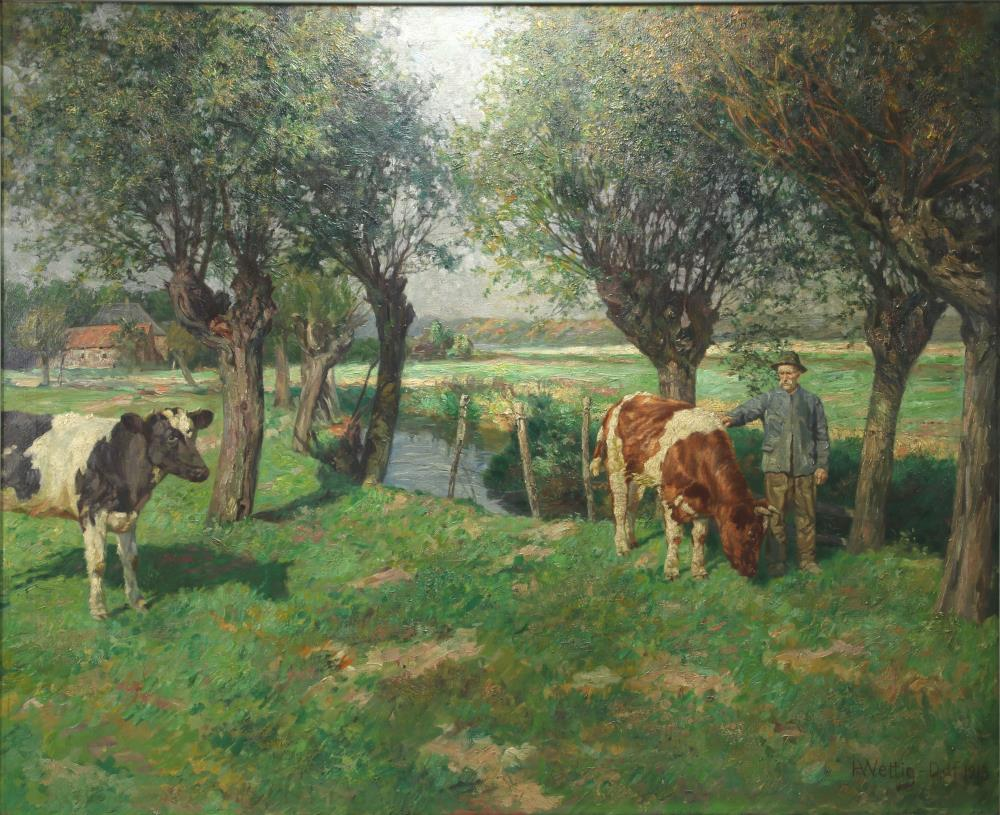 Unten Rechts mit "HWettig Ddorf 1913" signiert.